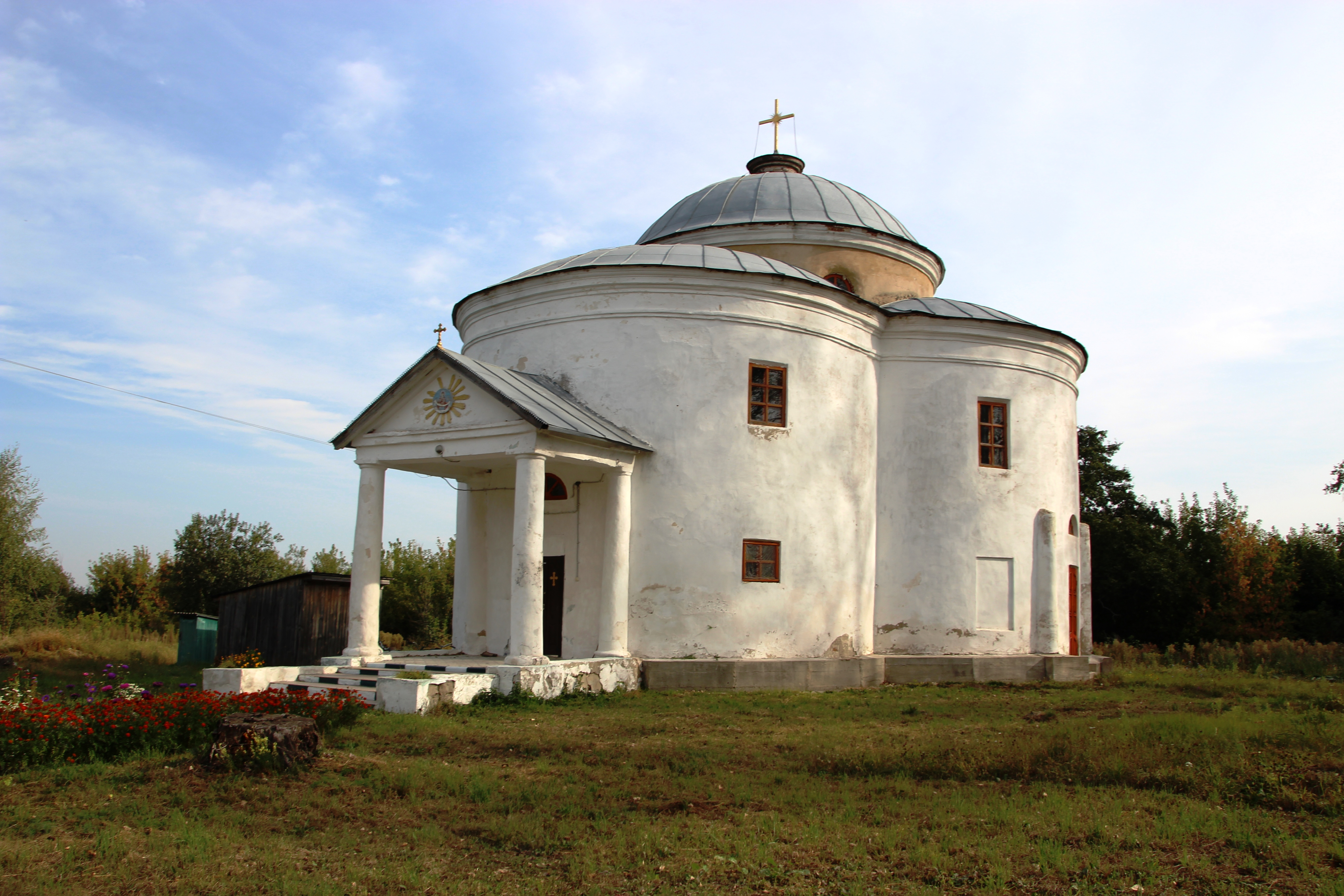 село Первомайське , Глухівський район, церква